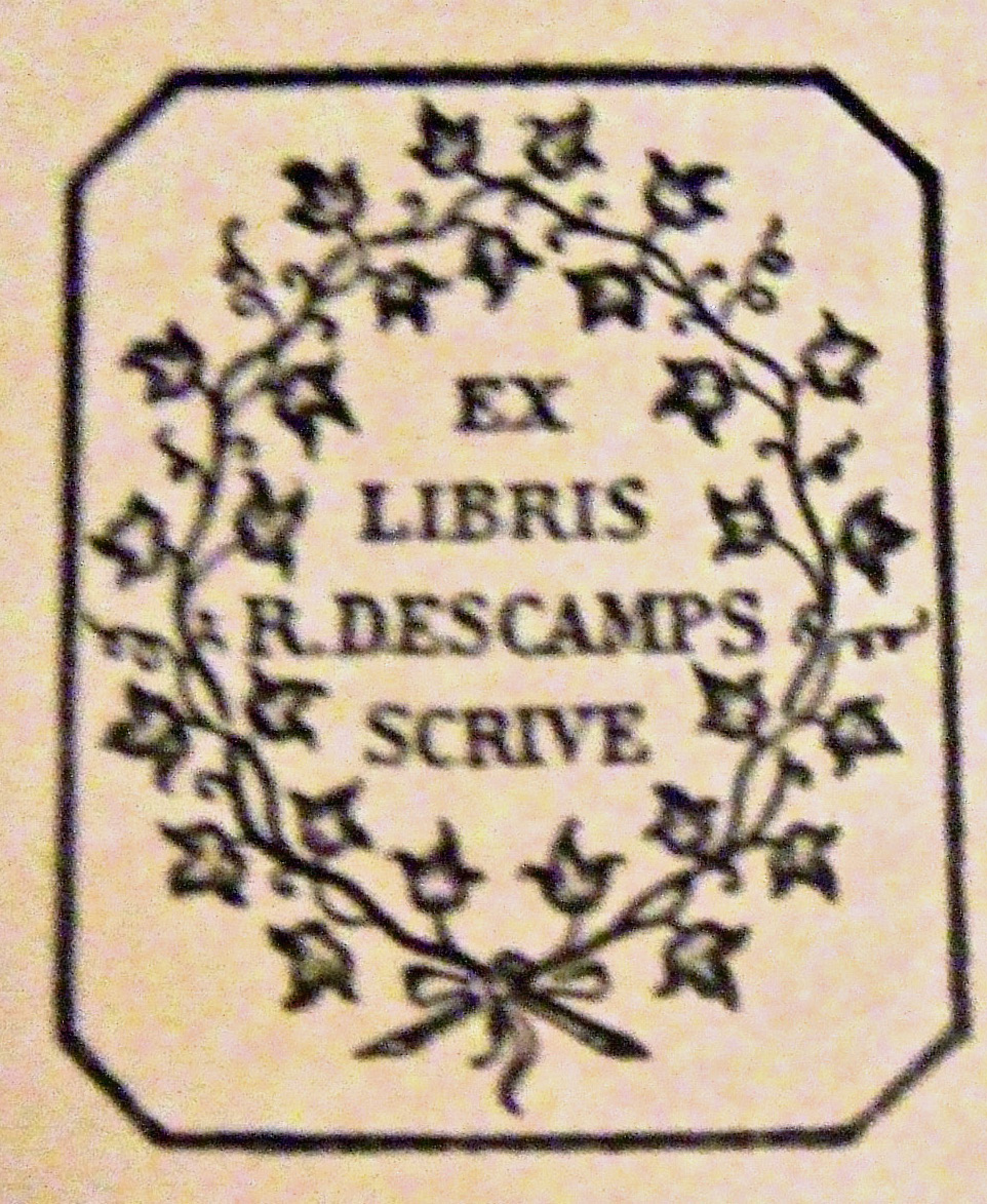 Ex-libris ornant les livres de la bibliothèque Descamps-Scrive.